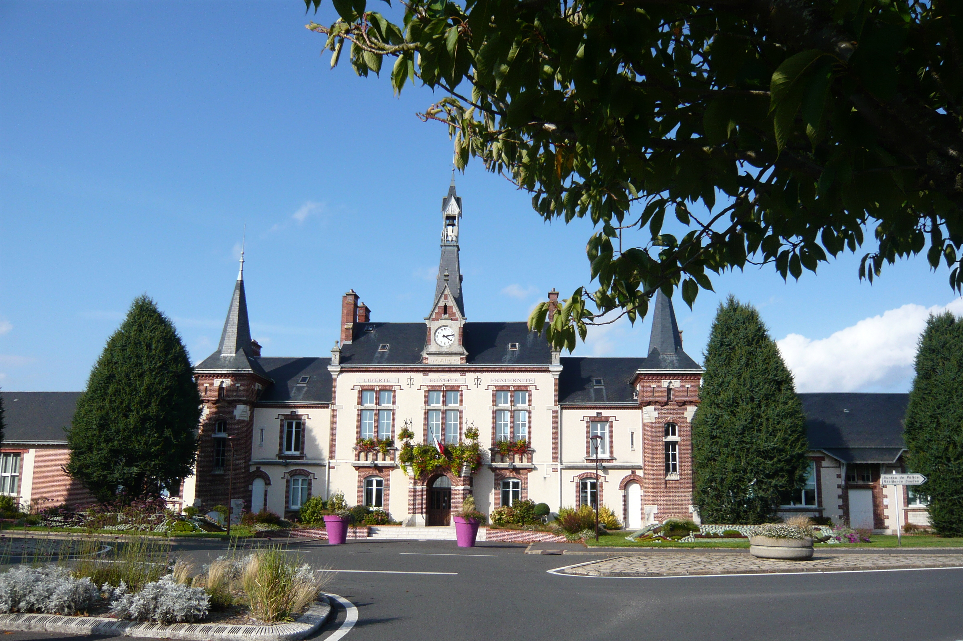 Mairie "La Folie" (1902), Mainvilliers, Eure-et-Loir (France).